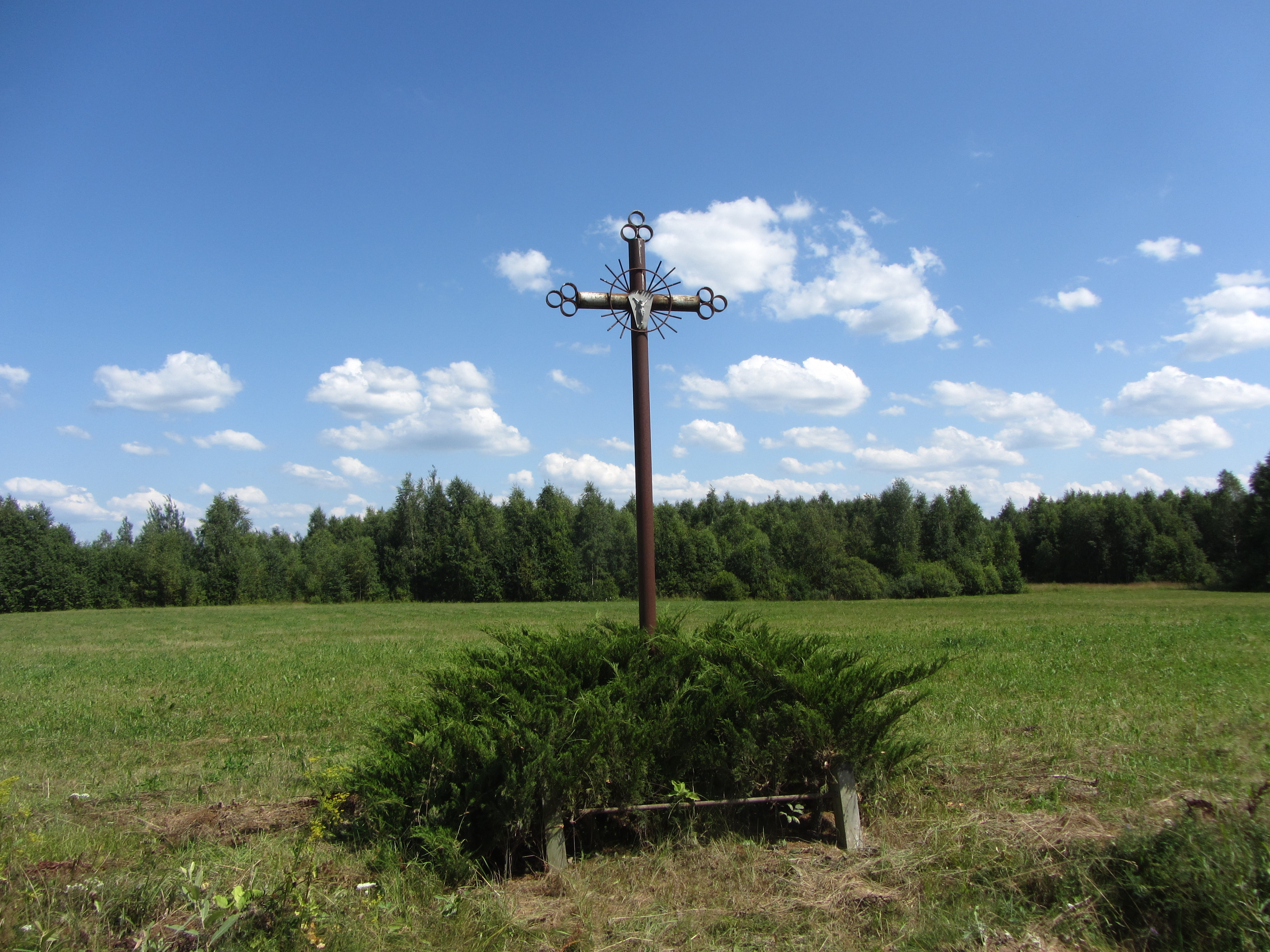 Adutiškio sen., Lithuania